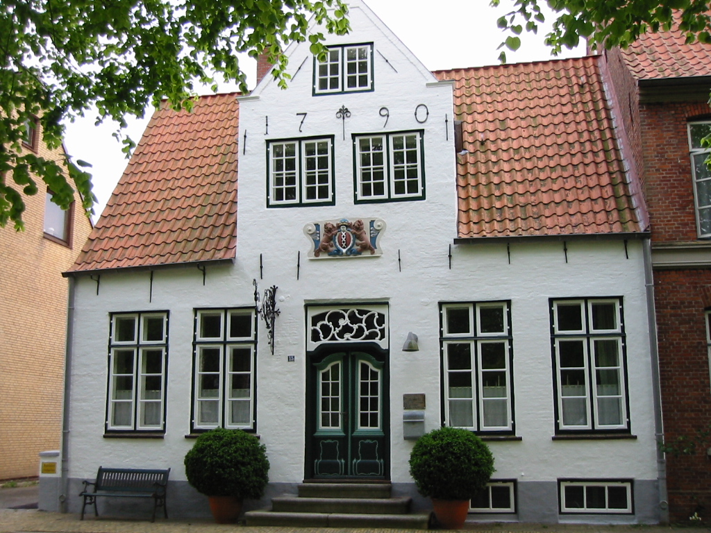 Amsterdammer Haus